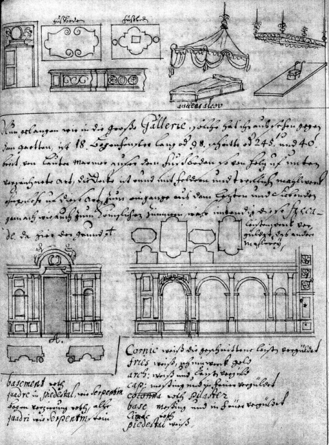 Christoph Pitzler Reisetagebuch 1685 1688 Folio 129. Versailles Grande Galerie